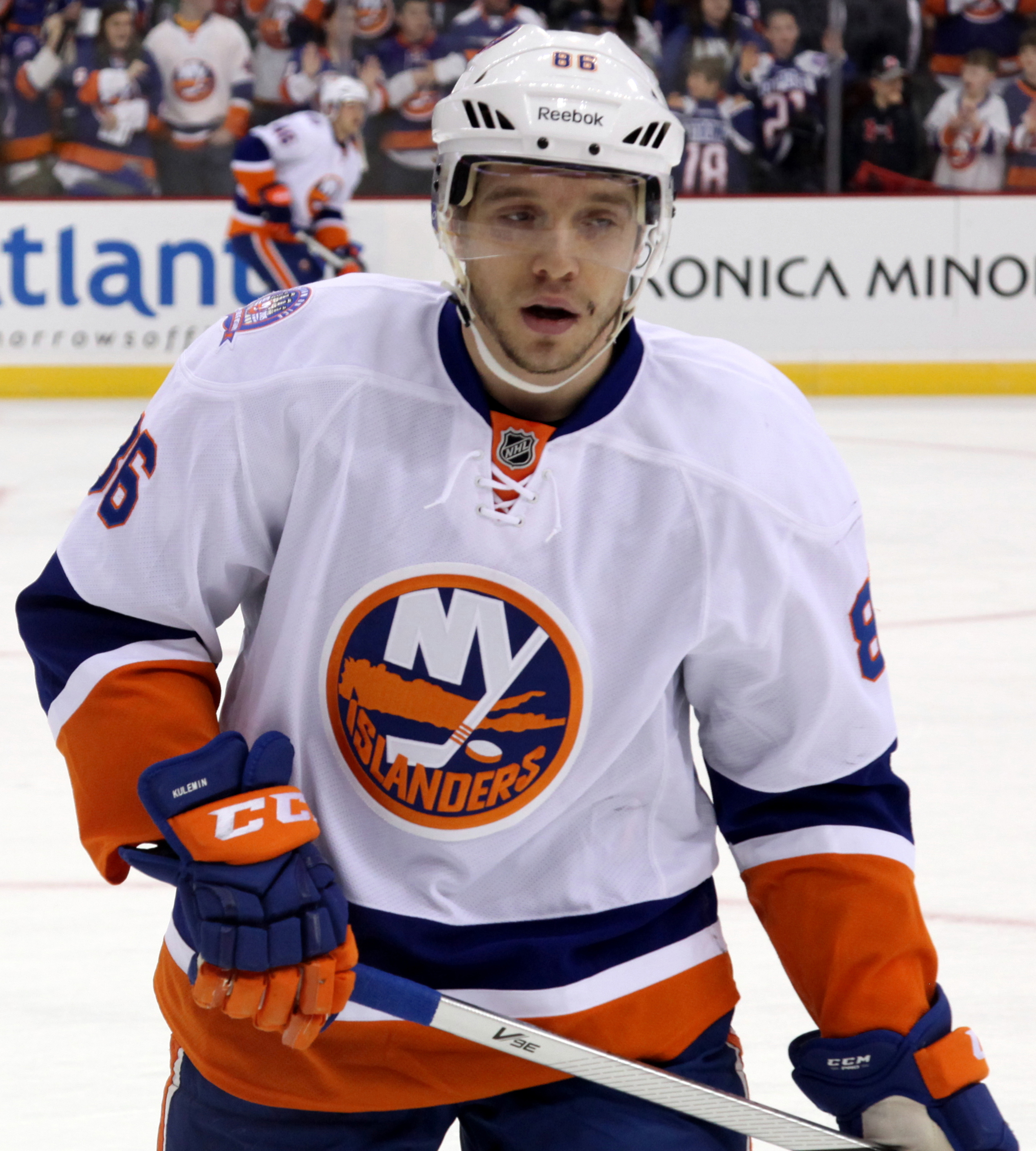 Kulemin in March 2015.